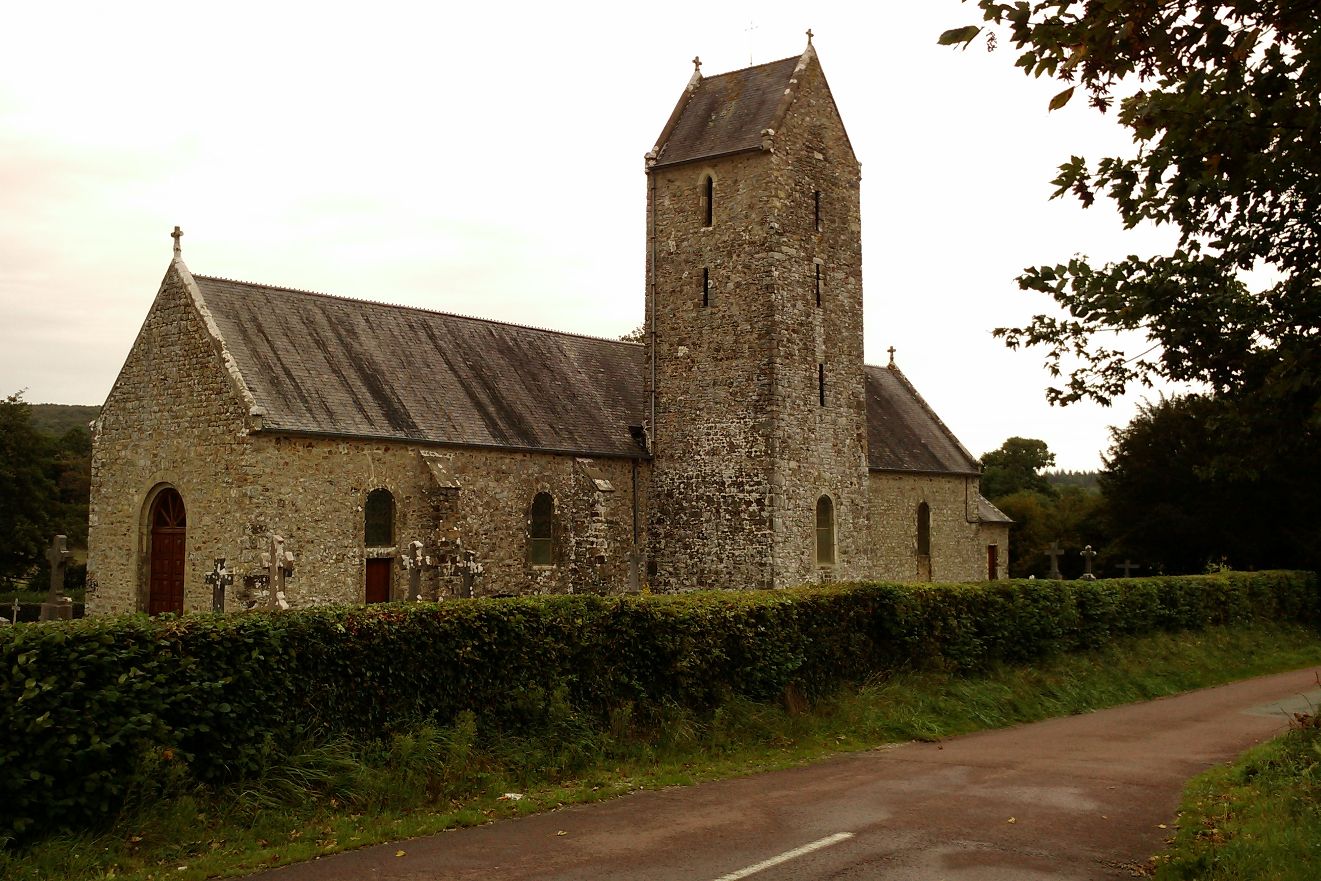 Neufmesnil